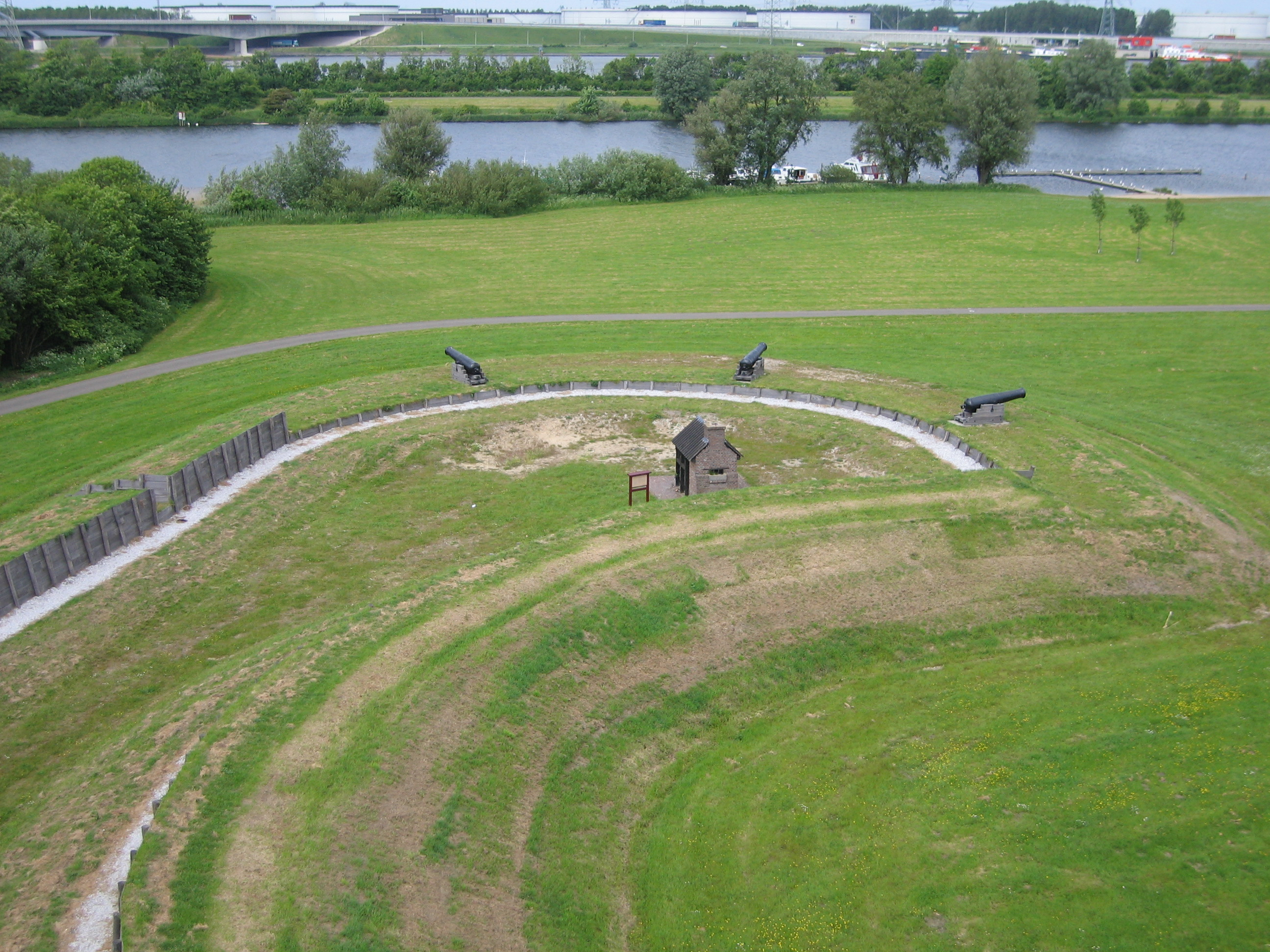 De kogeloven aan de Heindijk in Oostvoorne, gezien vanaf de Stenen Baak